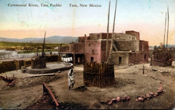 Taos Pueblo in pre-1923 postcard